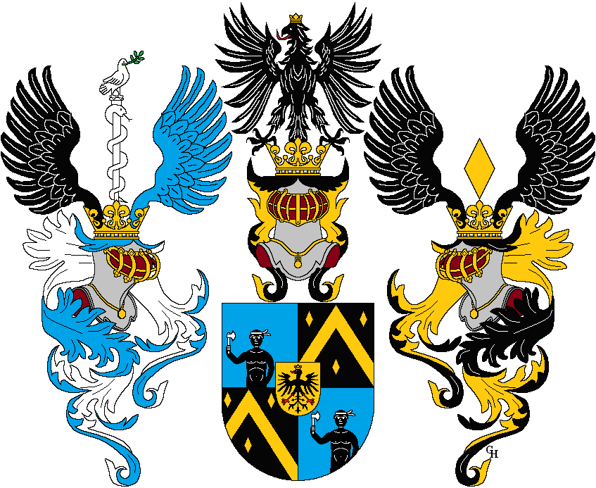 Wappen des habsburgischen Staatsmanns und Diplomaten Johann Christoph von Bartenstein (1689–1767), verliehen anlässlich seiner Erhebung in den Reichsfreiherrenstand 1732 (nach anderer Quelle 1733). Zeichnung von Gerd Hruška ( Für weitere Informationen zu dieser Standeserhebung siehe (